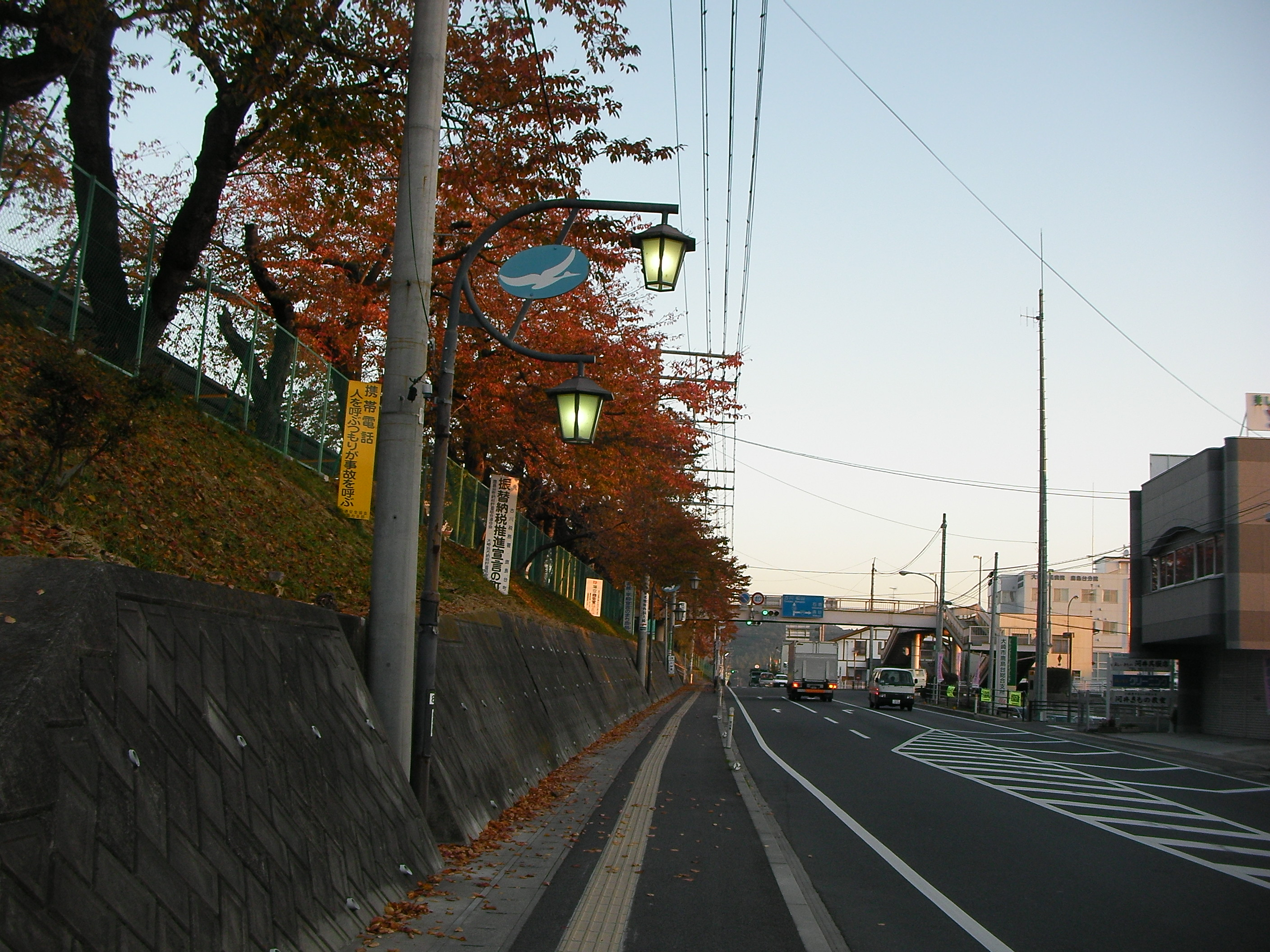 大崎市鹿島台支所前 鹿島台小学校の桜並木